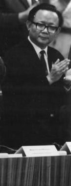 Nguyễn Văn Hiếu